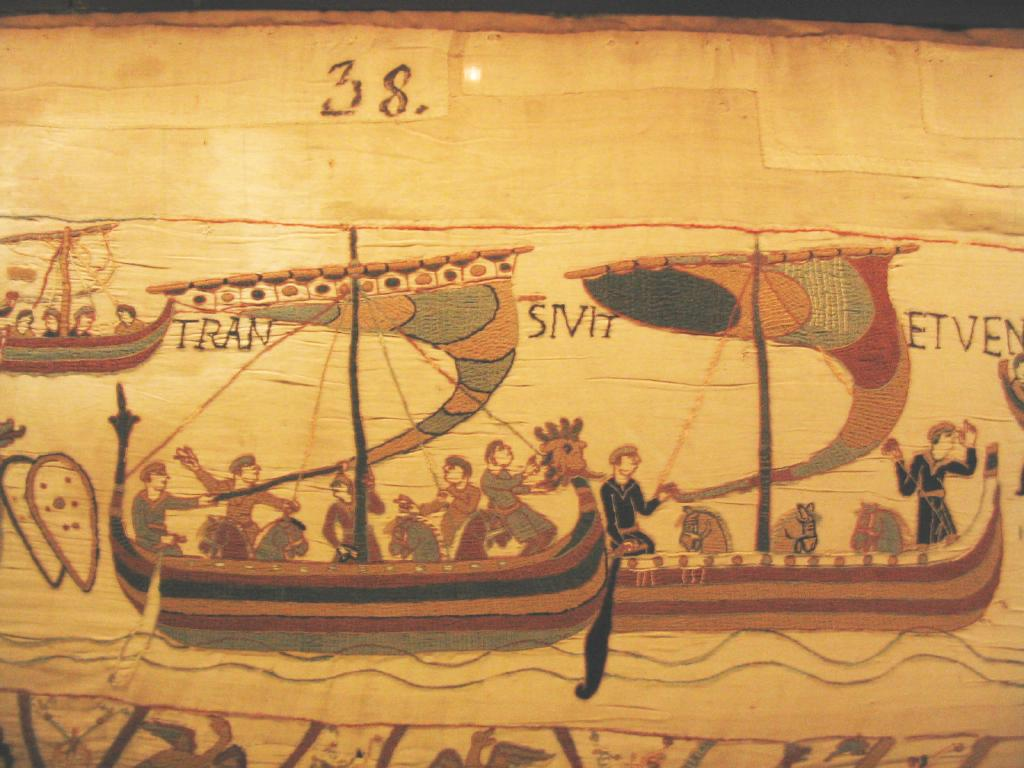 Bayeux Tapestry fragment